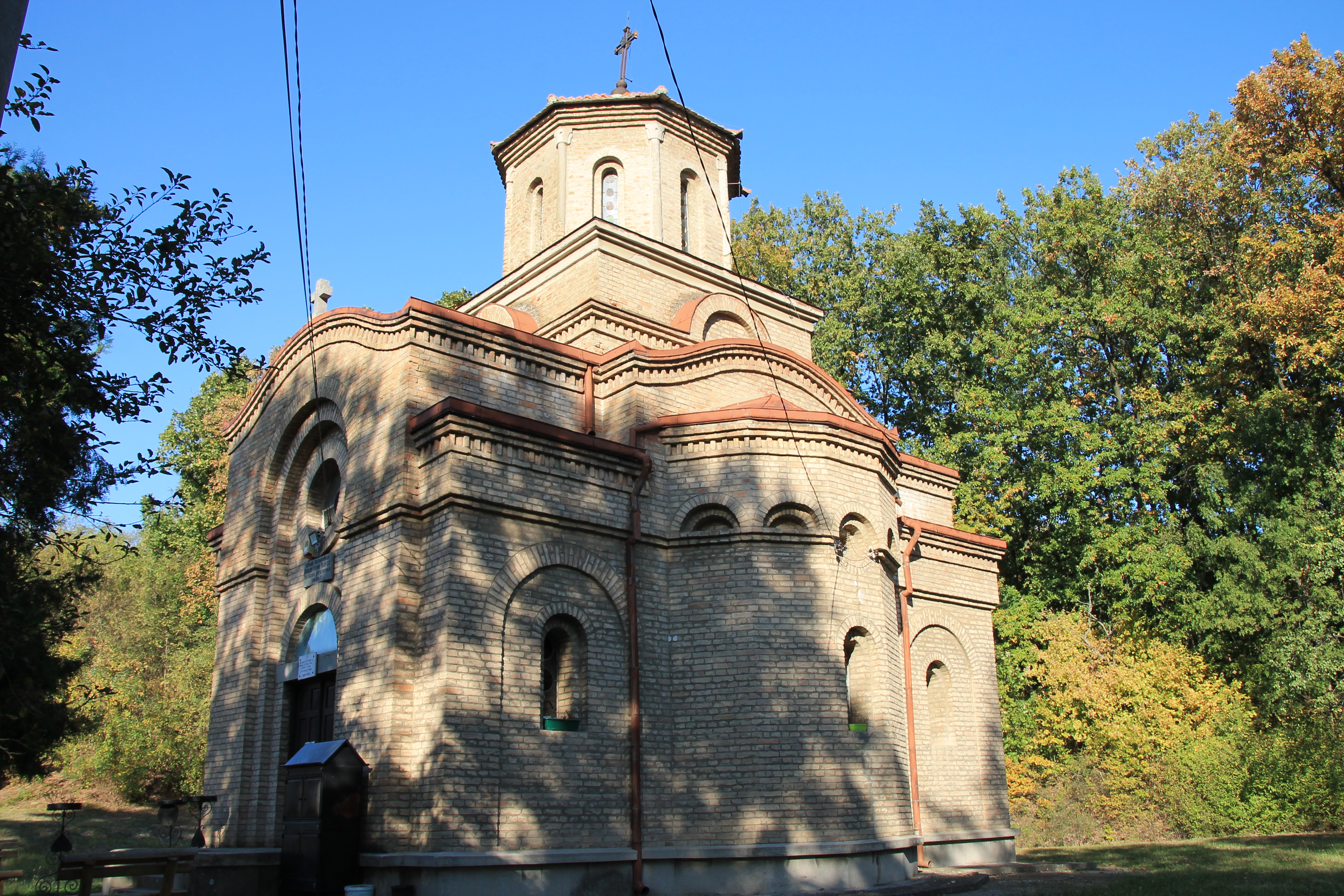 Radovanjski lug